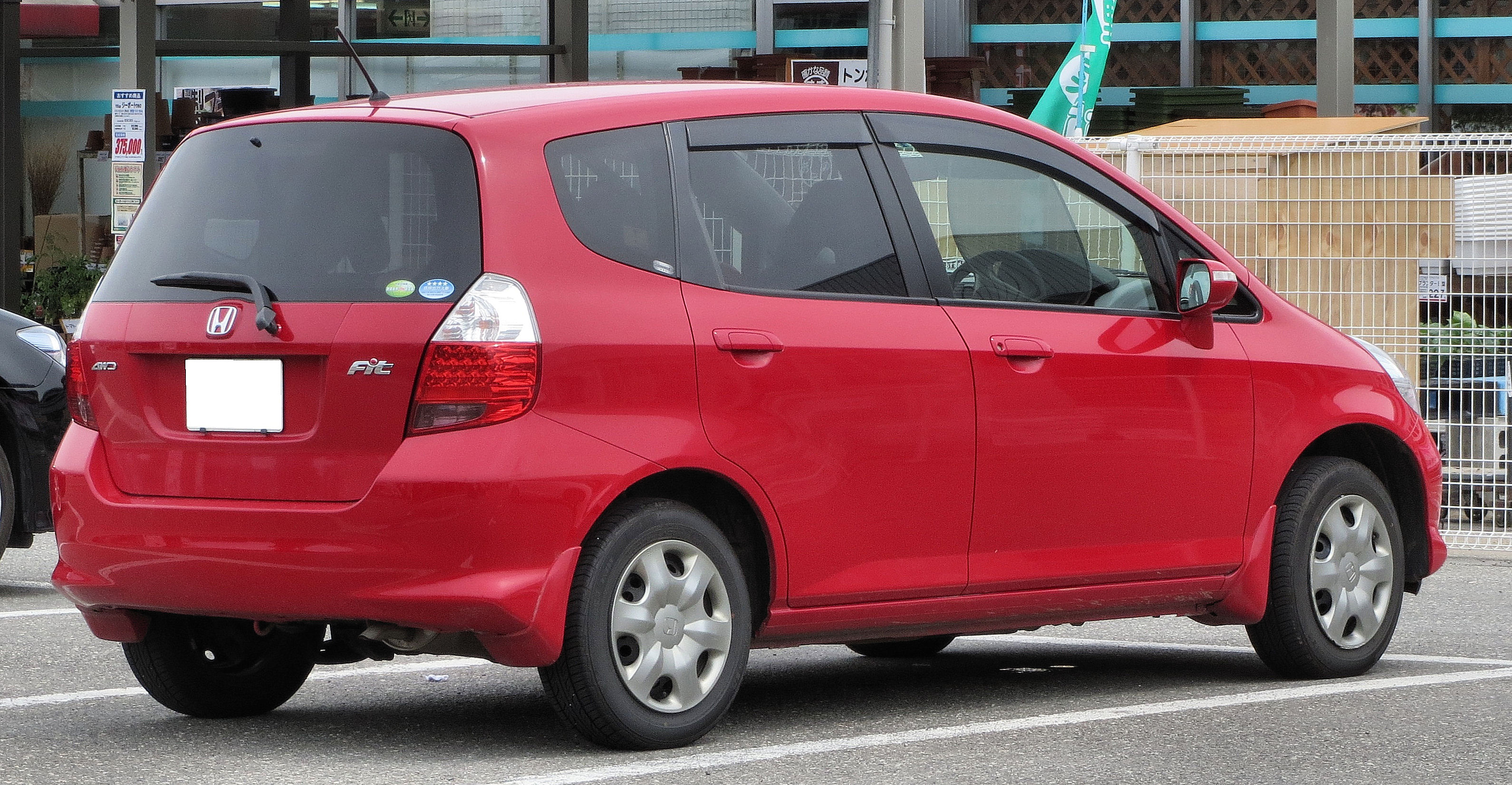 ホンダフィット 1.3W 4WD